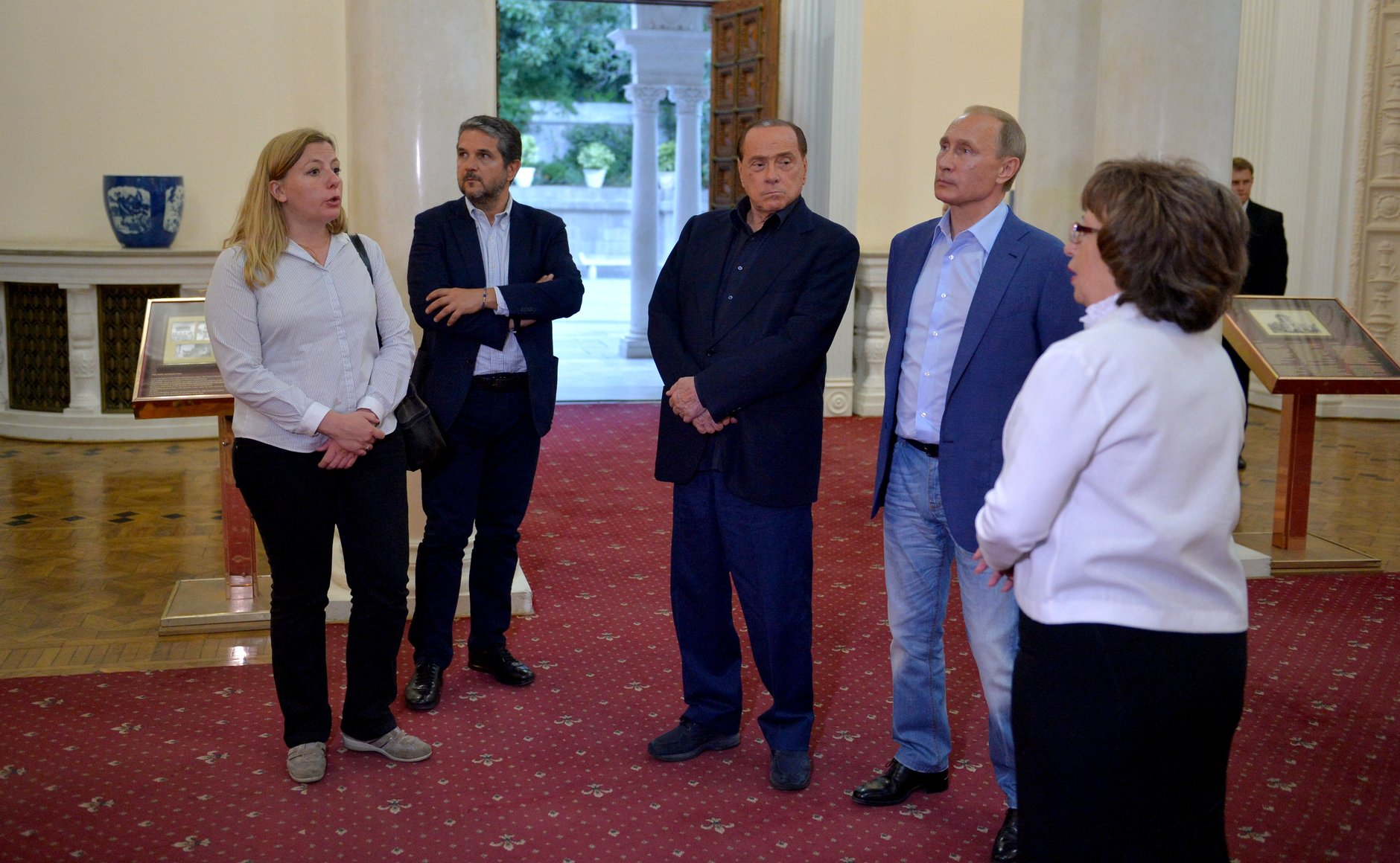 Владимир Путин встретился в Крыму с Сильвио Берлускони, находящимся в России с частным визитом